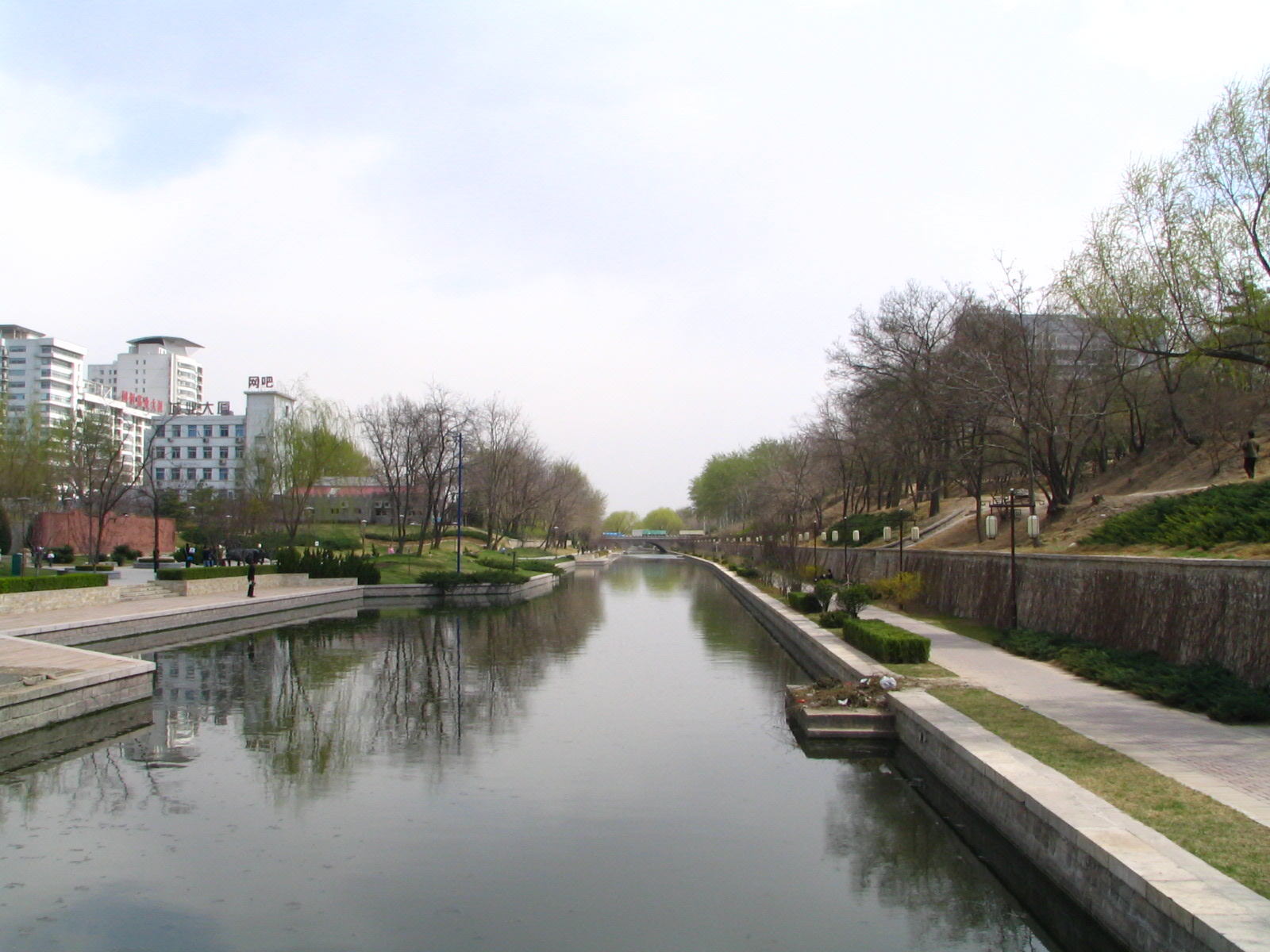 元大都遗址公园